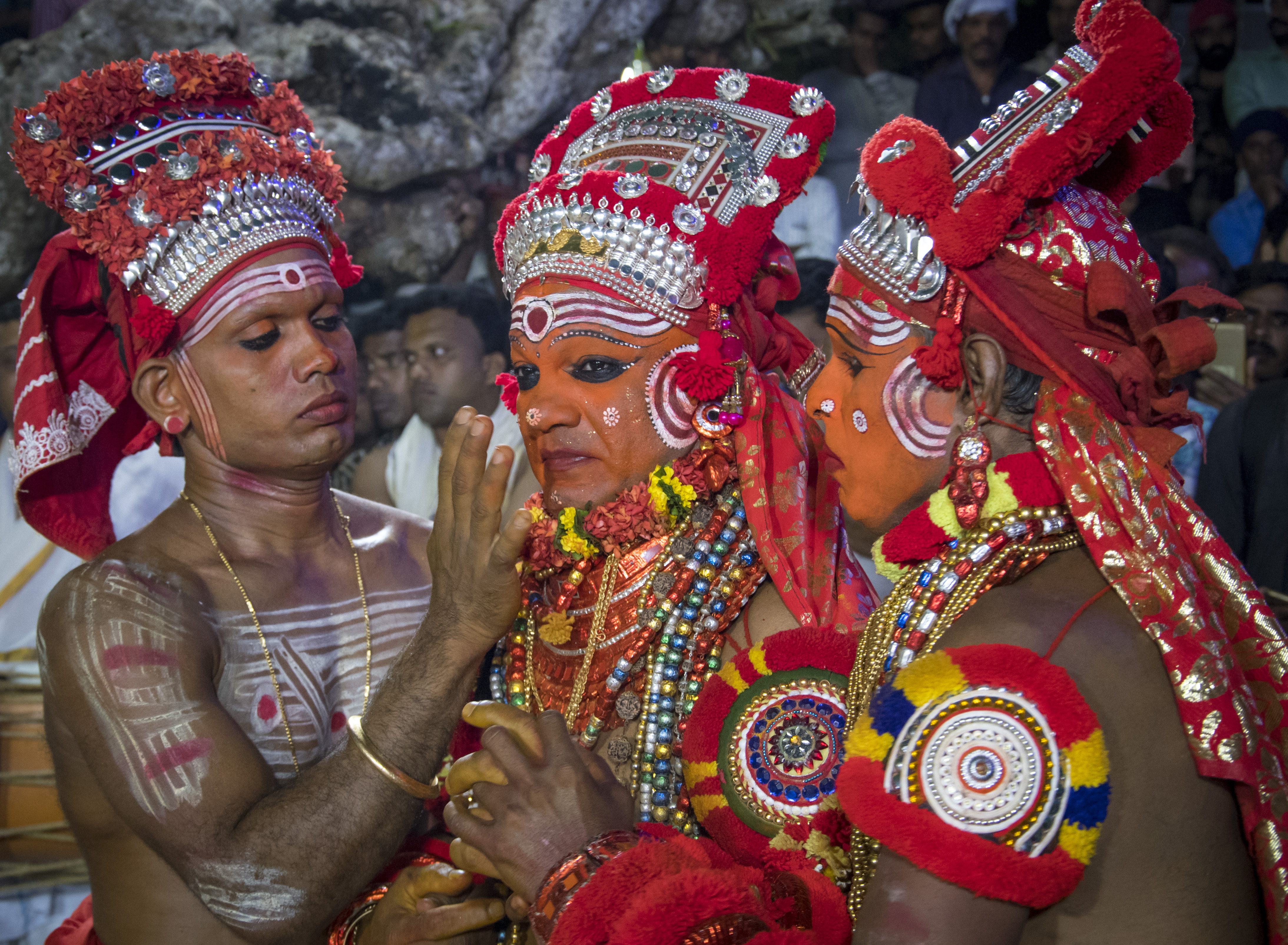 Theyyam at Kadavaankott maakkam Thira at Chala, Kannur